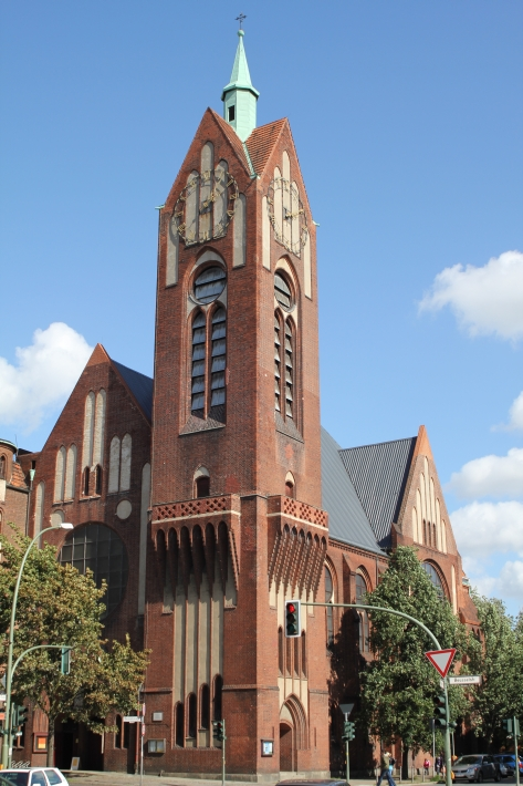 Reformationskirche Berlin-Moabit, Beusselstraße/ Ecke Wiclefstraße von Richtung Wittsotcker Straße aus gesehen, September 2010.